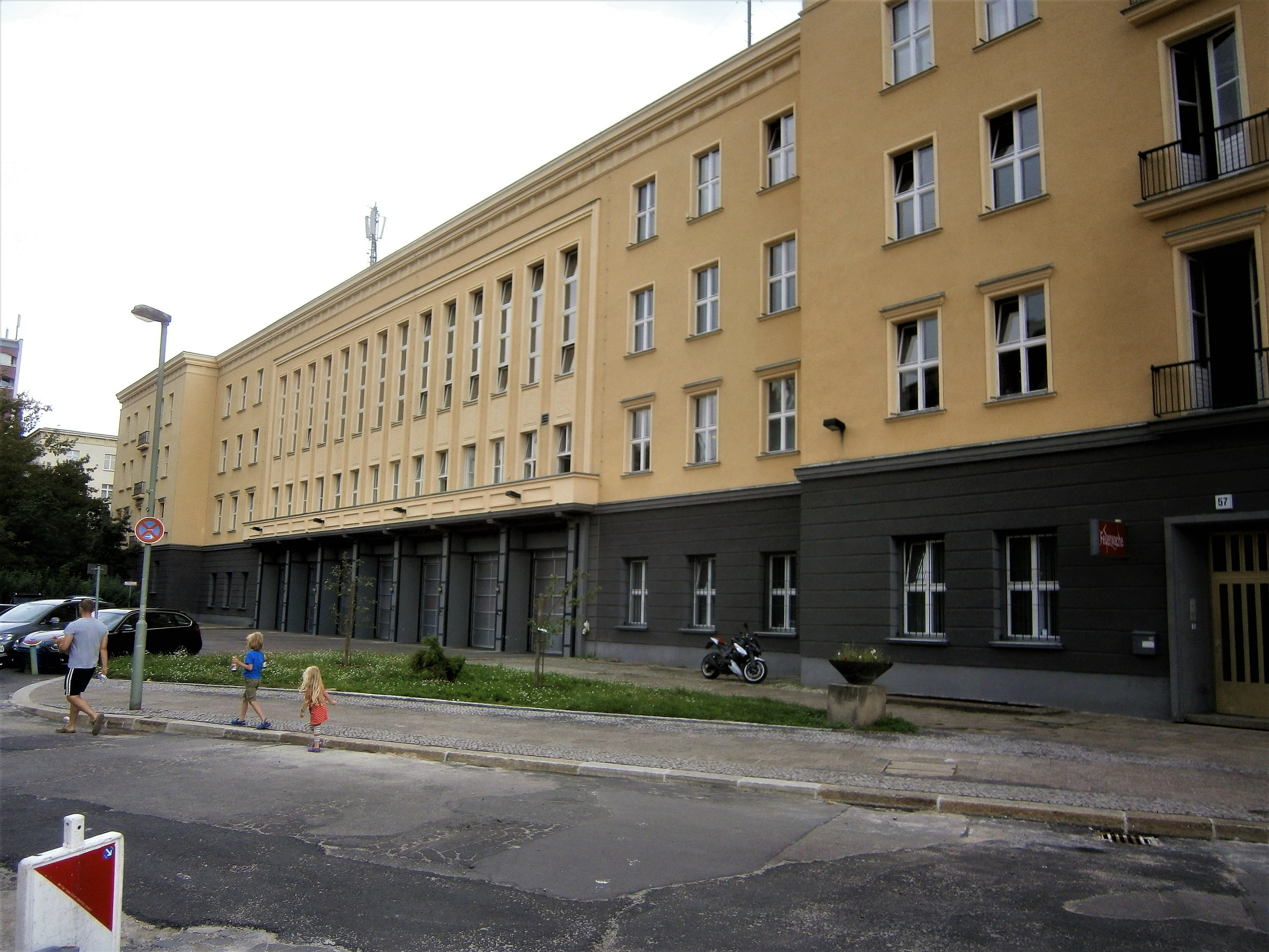 Die Marchlewskistraße ist eine Straße im Berliner Bezirk Friedrichshain-Kreuzberg, Ortsteil Friedrichshain. Angelegt und benannt wurde sie um 1870 auf dem Communicationsweg außerhalb der abgerissenen Berliner Zollmauer unter dem Namen Memeler Straße. Im Jahre 1950 erfolgte die Umbenennung in Marchlewskistraße. Schwere Schäden an der Bebauung bei Luftangriffen im Zweiten Weltkrieg brachten beim Neuaufbau Änderungen, jedoch der Straßenlauf blieb erhalten. Das Bild zeigt im Einzelnen: Im Westflügel des Polizei-/ Feuerwehrkomplexes befinden sich die Unterstände und Ausfahrt der Feuerwehrfahrzeuge.